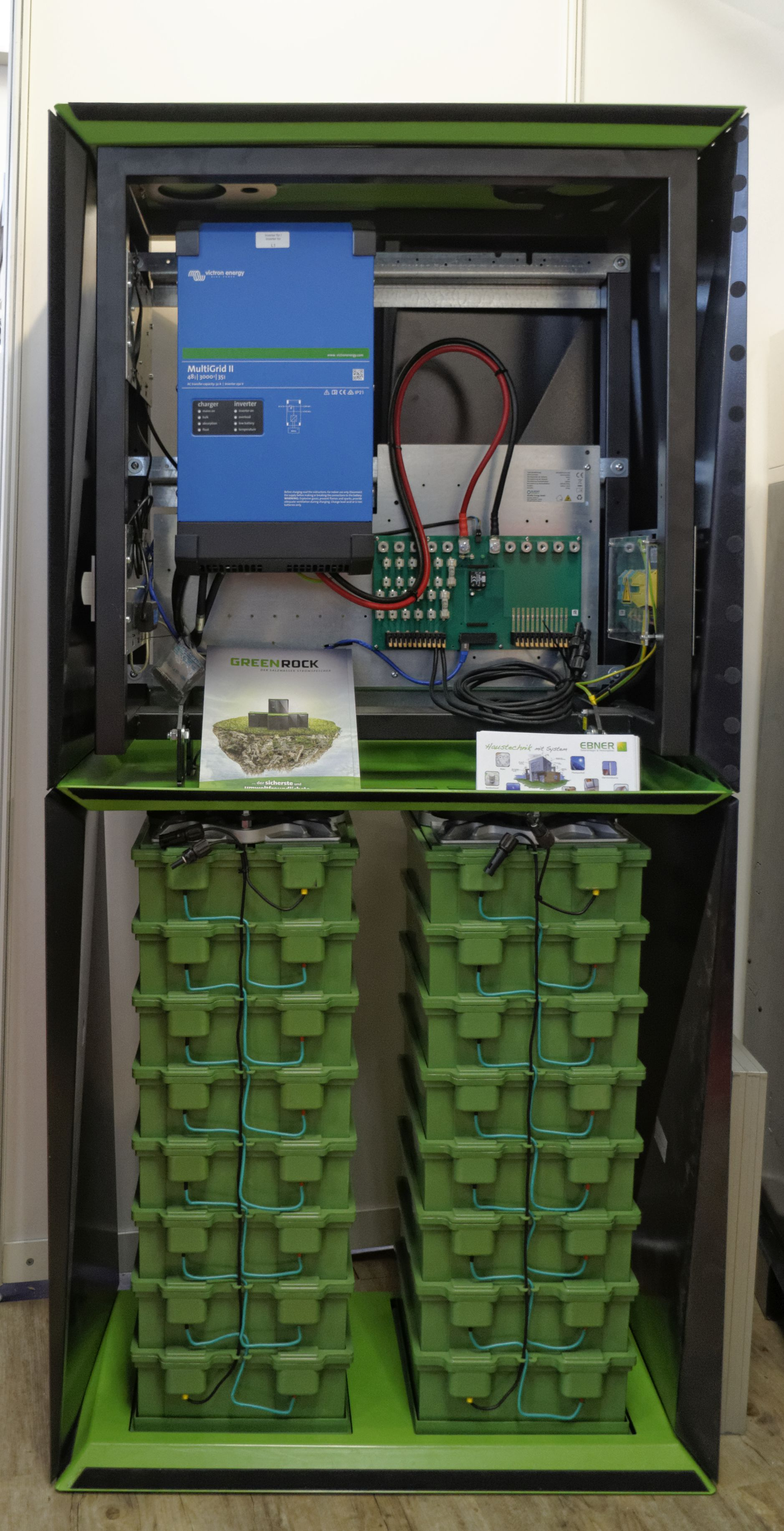 Sindelfingen Haus & Energie 2019 - Mehrere Natrium-Ionen-Akkumulatoren in Form grüner Boxen mit einem Wechselrichter